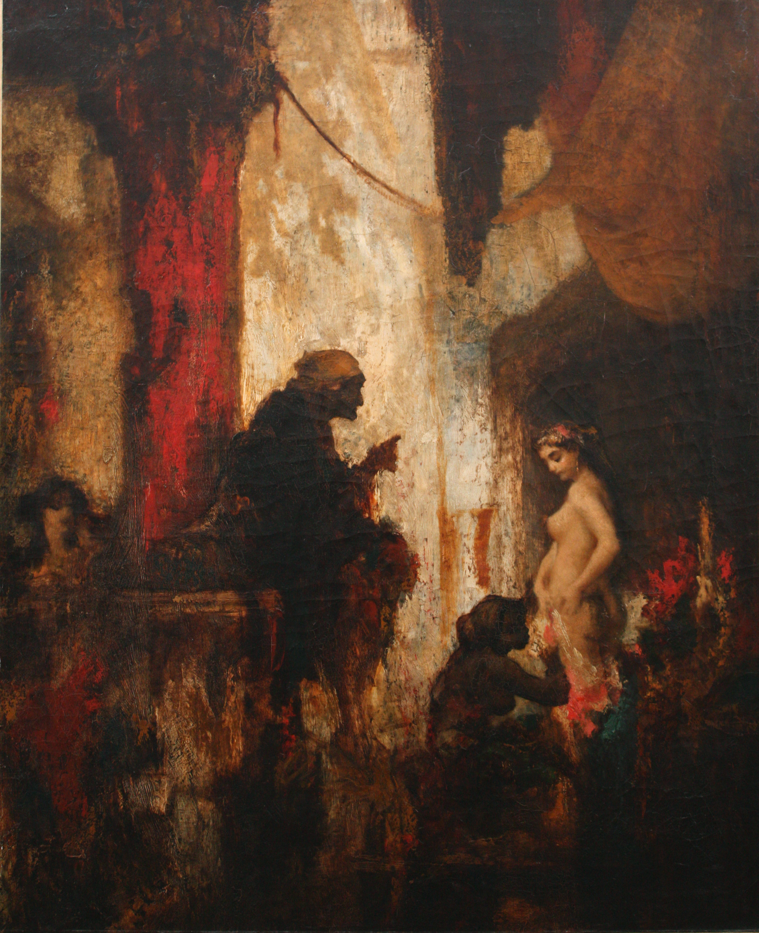 Scène de Harem, par Diaz de la Pena, collection du musée d'art et d'histoire de Meudon, inv. 1974-1-84.